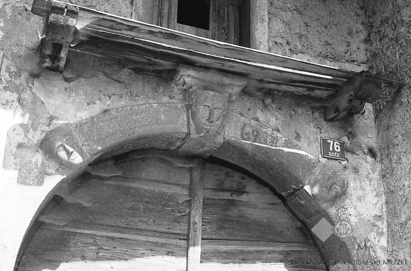 Zgornji del kalone s 3 glavami (Gašper, Miha, Boltežar?), Goče.